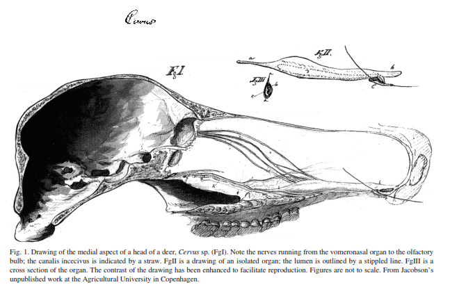 Illustration av VNO i hjort.